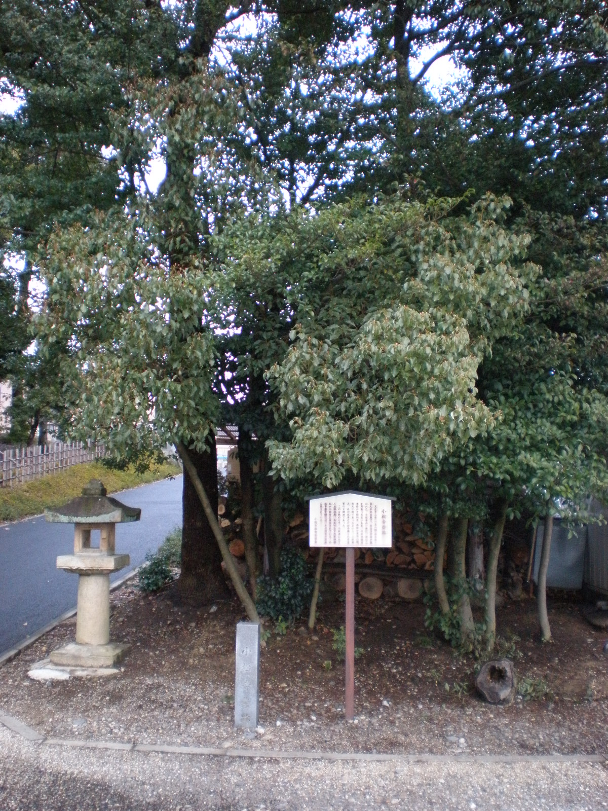 愛知県小牧市にある小松寺砦（小松寺山砦）跡